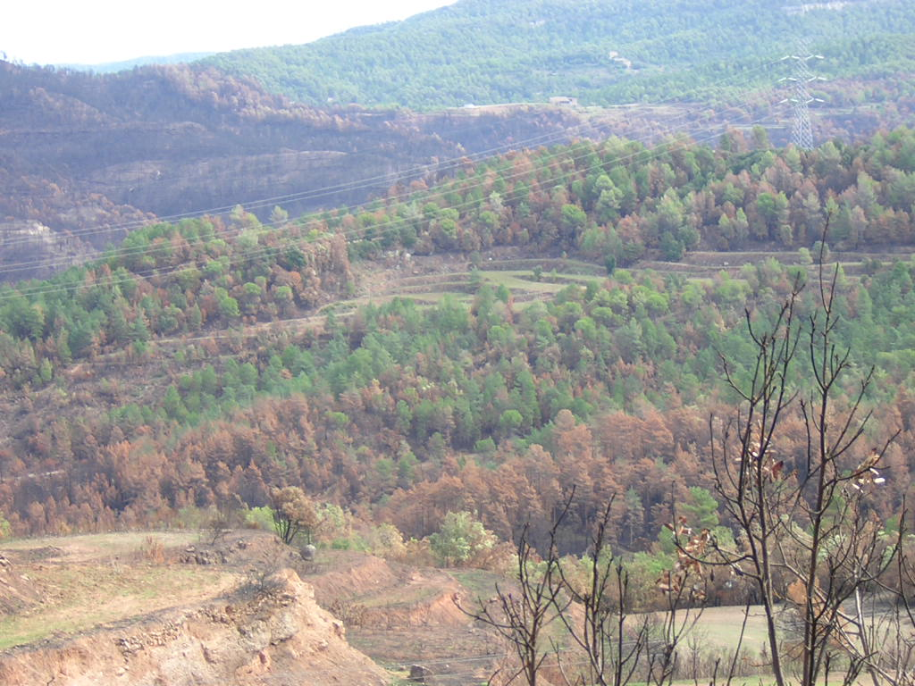 L'Otzetó, lloc on era i quintanes (Monistrol de Calders, Moianès)